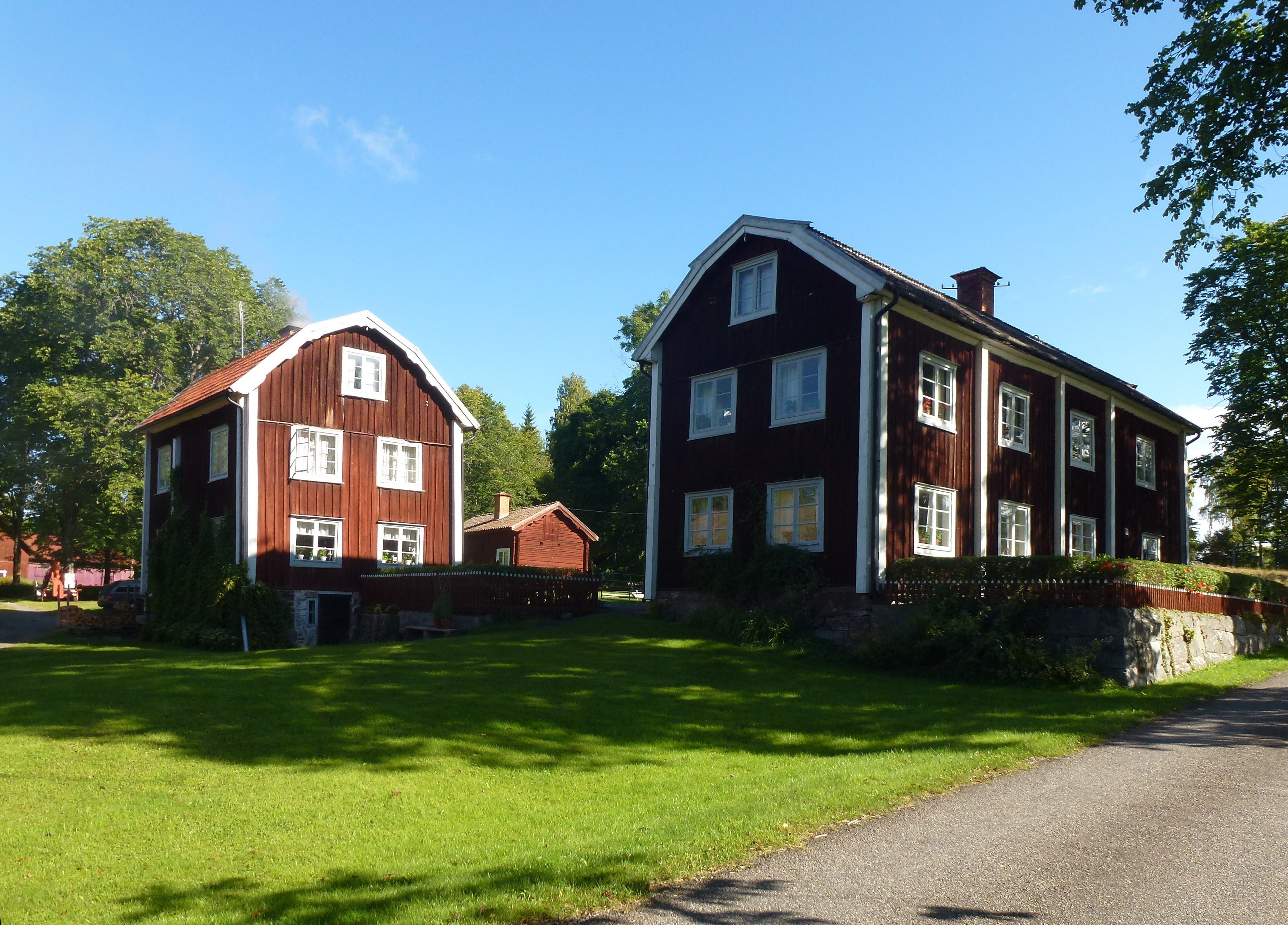 Bråfors bergsmansby